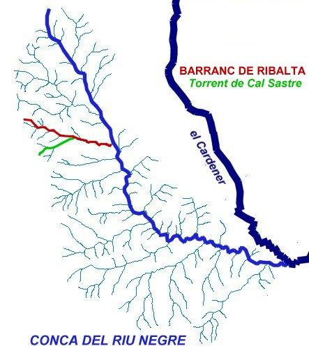 Mapa de la conca del riu Negre (Solsonès) amb detall del barranc de Ribalta i el torrent de Cal Sastre